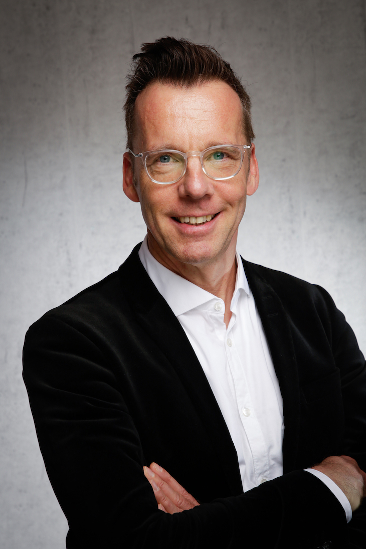 Bild von Uwe Wilkesmann 3